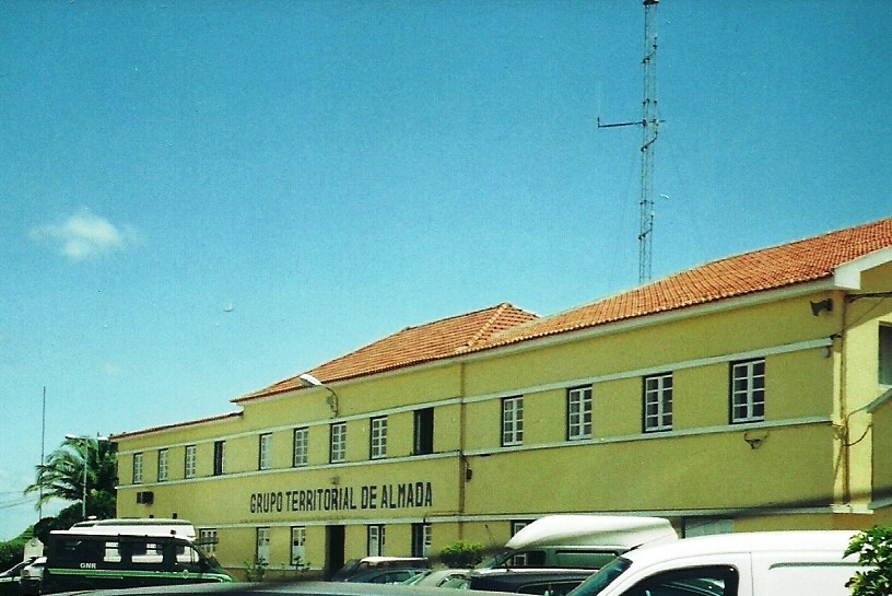 Forte de Almada, freguesia e concelho de Almada, distrito de Setúbal, Portugal.